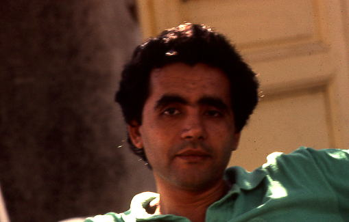 L'écrivain et poète algérien Habib Tengour en 1989